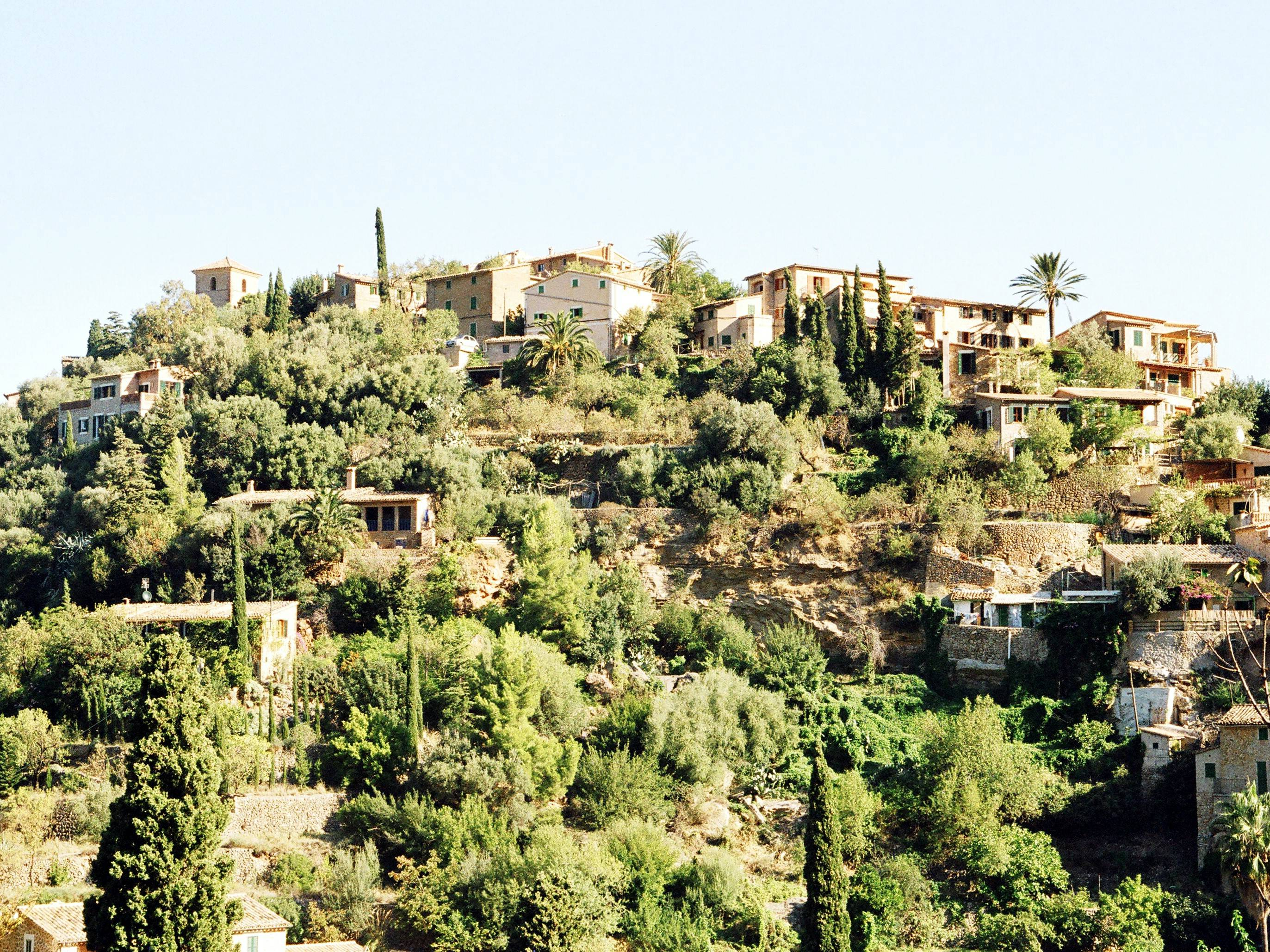 Deia, Ort an der Westküste der Baleareninsel Mallorca